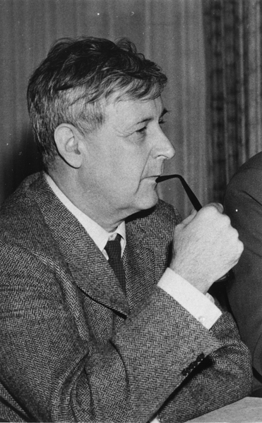 portrett, mann, forfatter, kringkastingssjef, sittende halvfigur.